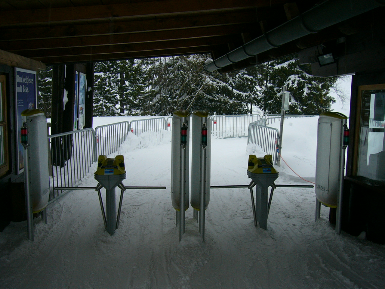 Automatisierte Berechtigungskontrolle am Zugang für einen Sessellift, Sudelfeld (Bayern).